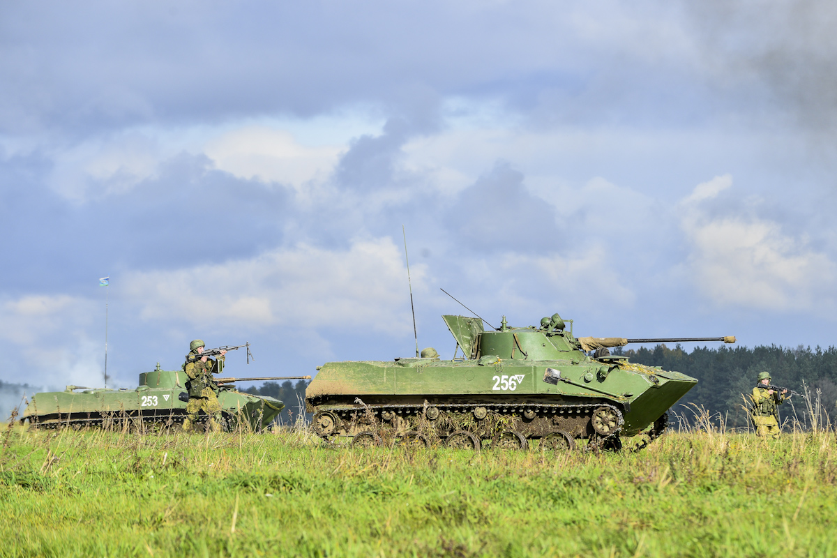 Десантирование и захват объекта в рамках совместного учения ВДВ РФ и РБ.